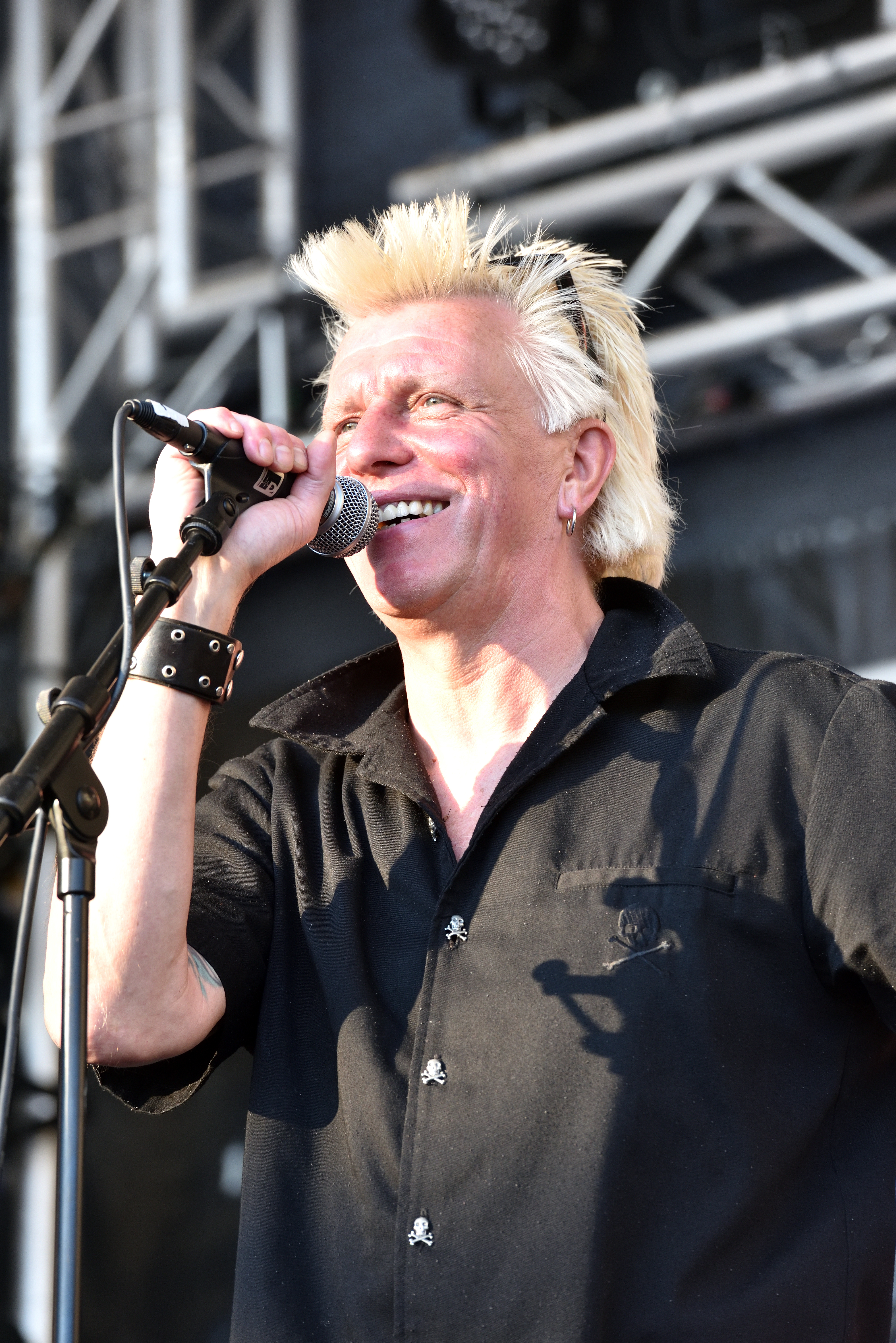 Slime beim Hafen Rock 2016 in Hamburg